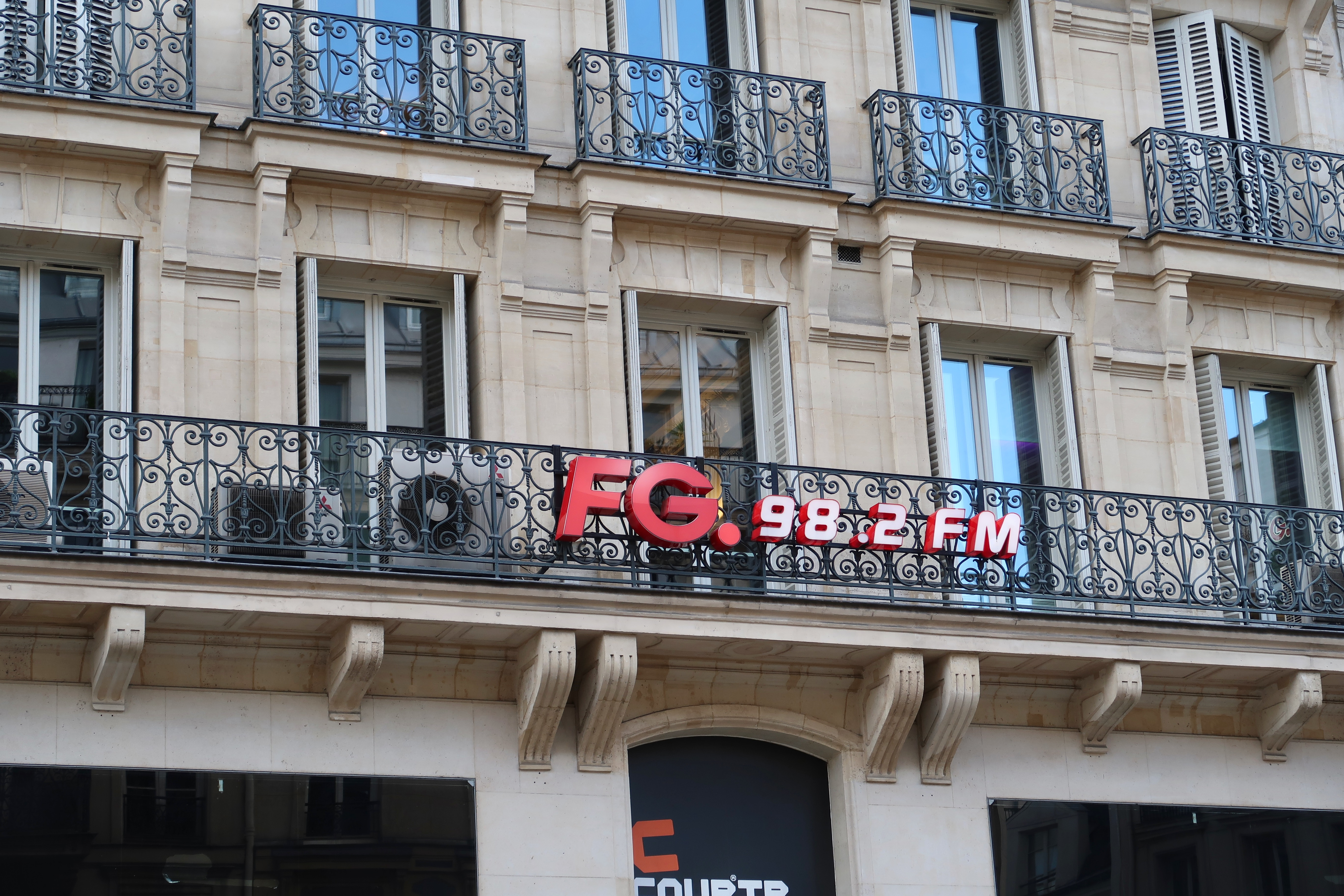 Siège de Radio FG, 51 rue de Rivoli (Paris, 1er).